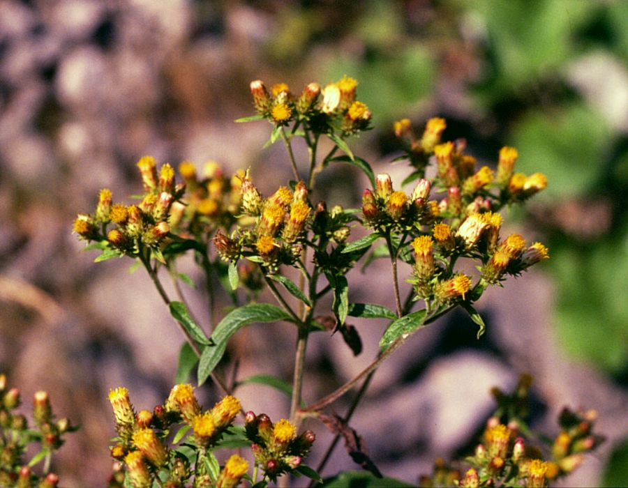 Dürrwurz (Inula conyzae), Korbblütler (Asteraceae) - Österreich/Austria/Autriche: Niederösterreich, Erlauftal, Vordere Tormäuer